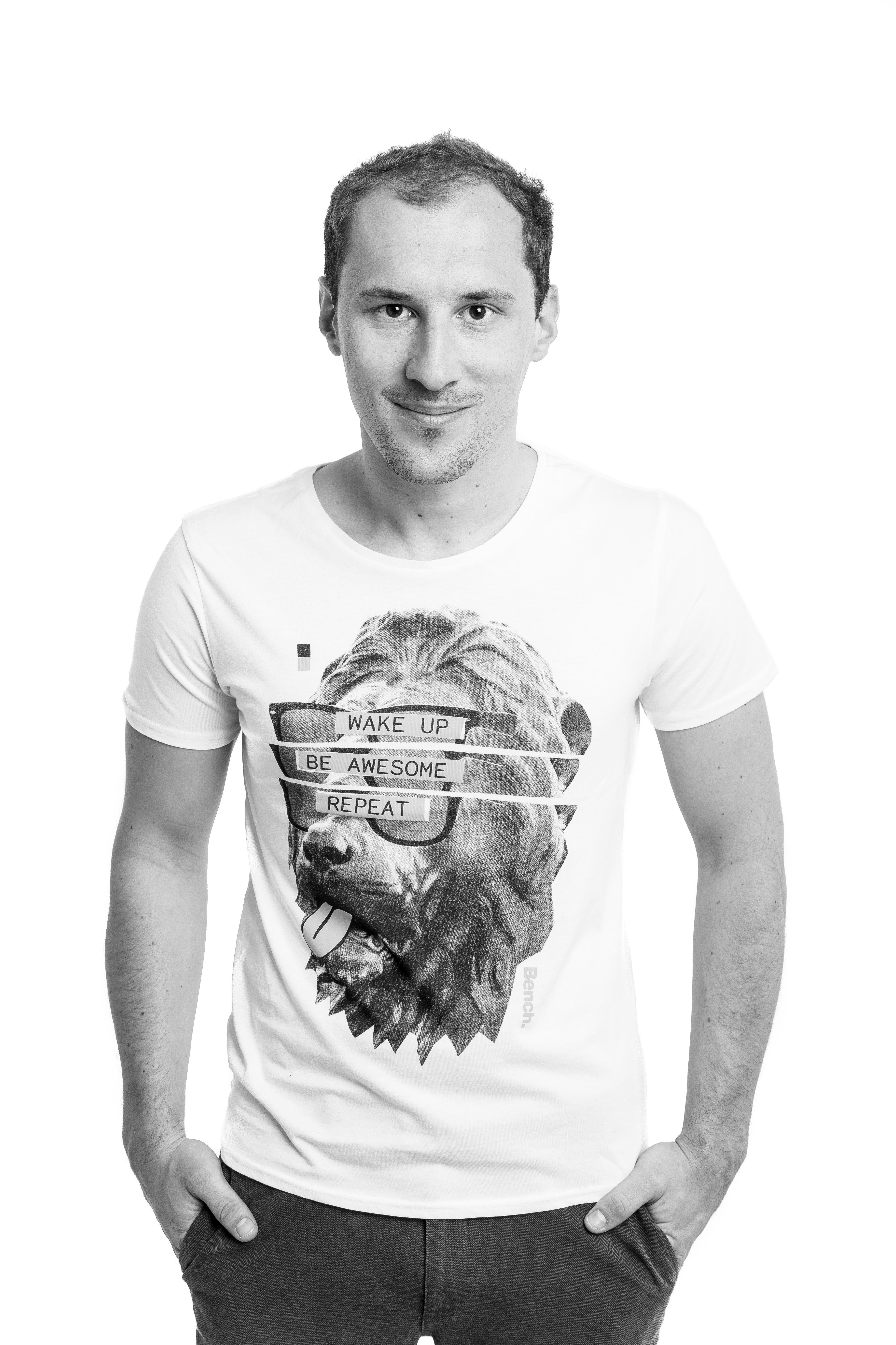 Radiomoderator Dominik Kollmann